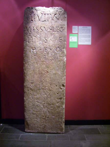 Grafsteen Marcus Julius (Gipsafgietsel, Ruimte XI, 03831) Grafsteen Marcus Julius. CIL XIII 8711: M(arcus) Iulius M(arci) f(ilius) / missus leg(ionis) V / h(ic) s(itus) e(st) / h(eres) f(aciendum) c(uravit)